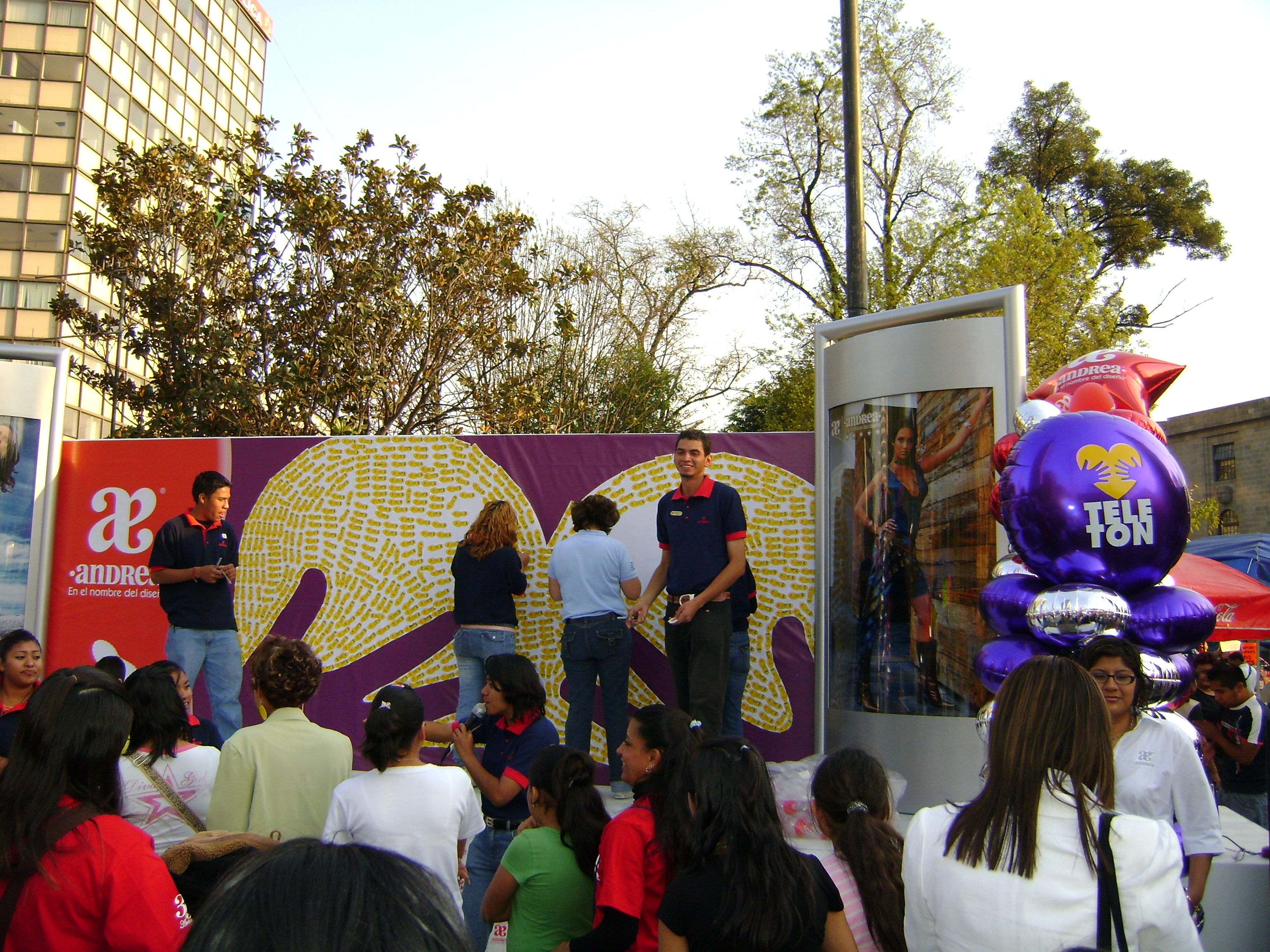 VOLUNTARIOS EN PROMOCION A LA DONACION DEL TELETON UBICADOS EN EL PASEO DE LA REFORMA Y ENFRENTE A LA TORRE MAYOR